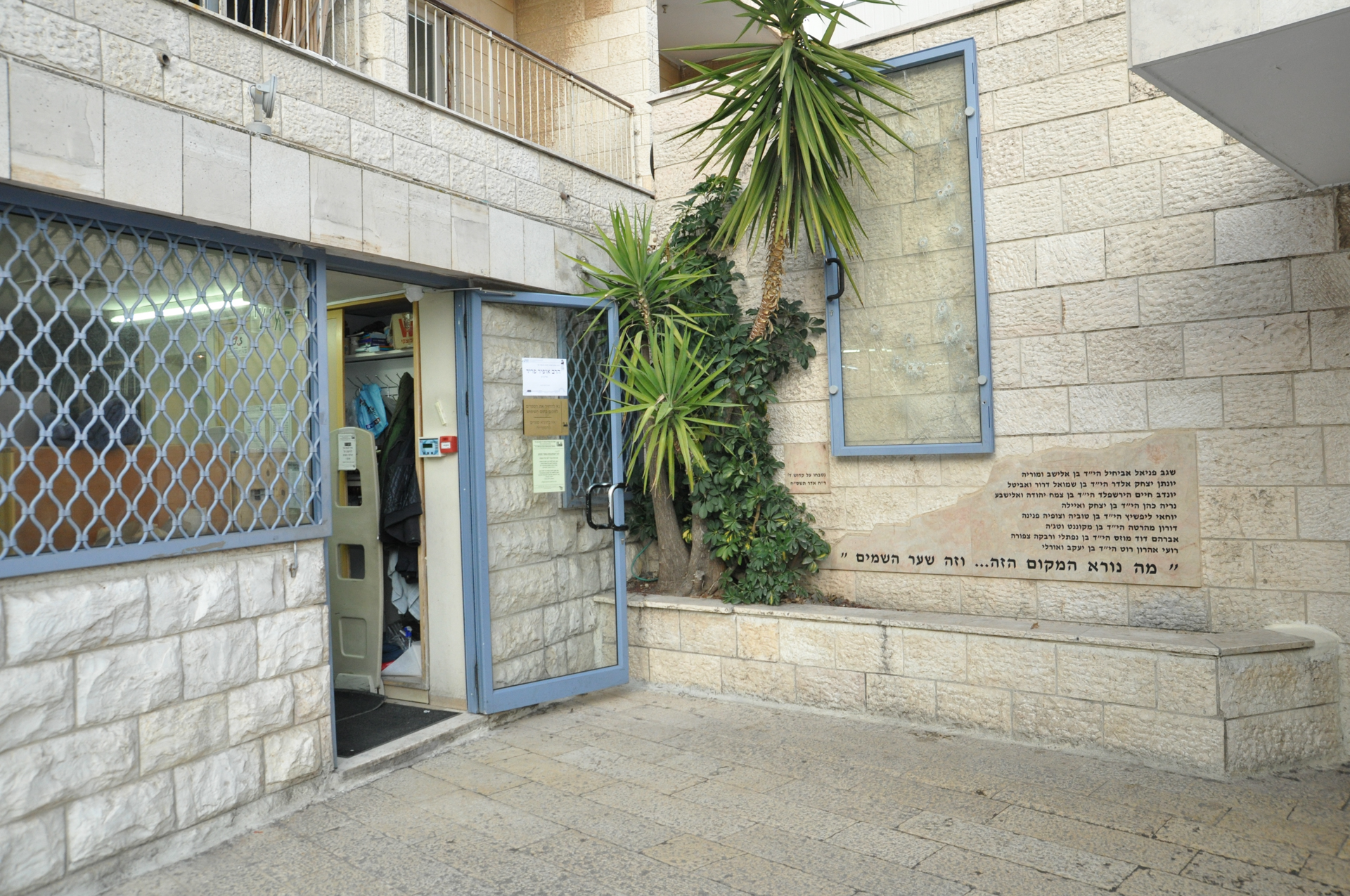 כניסה לספריה בישיבת מרכז הרב